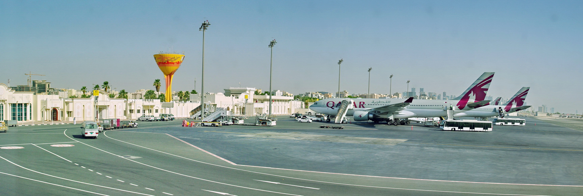 Ansicht Aussenbereich Flughafen Doha